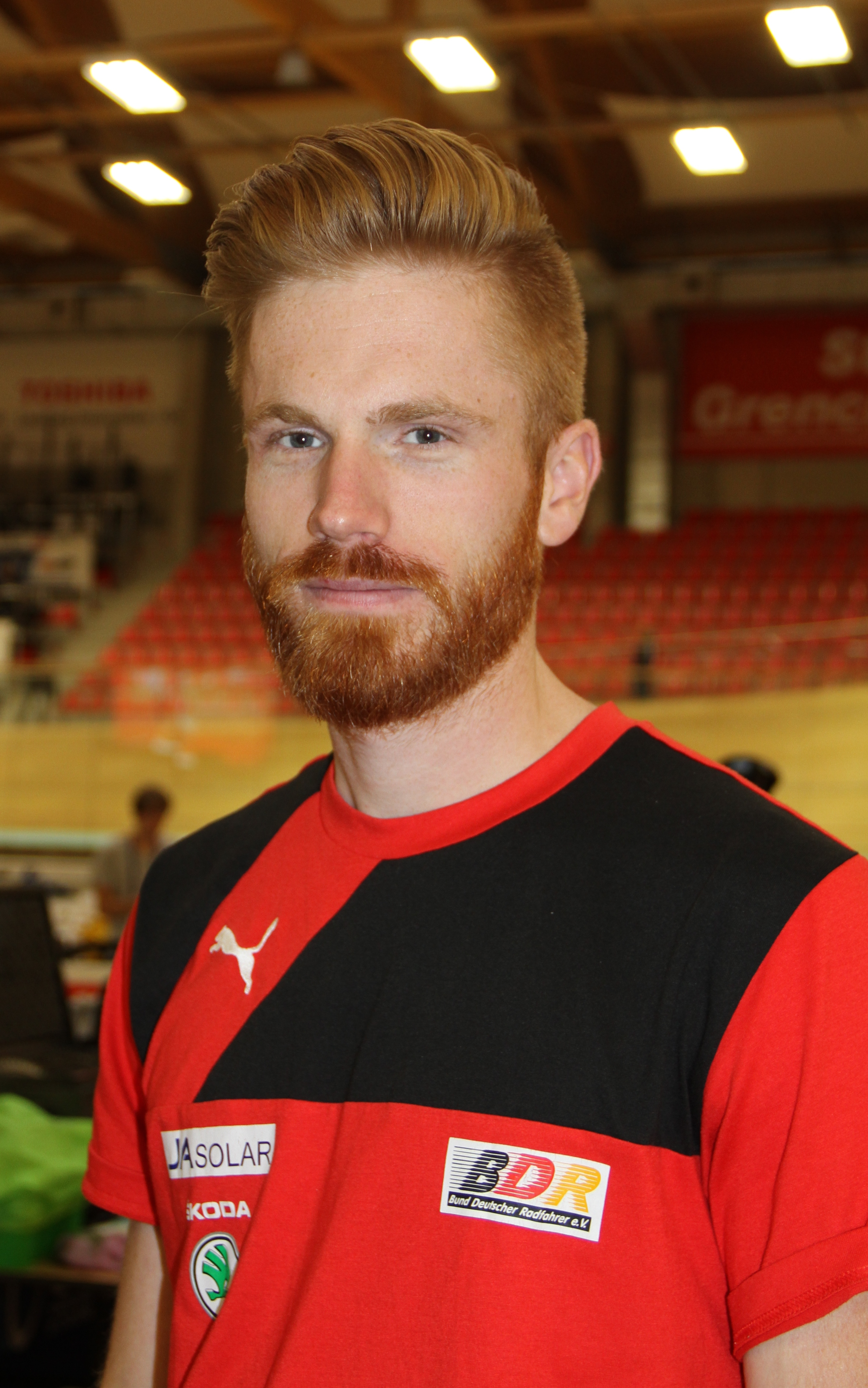 Sven Meyer, deutscher Radsporttrainer The making of this document was supported by the Community-Budget of Wikimedia Germany.